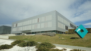 Edifici de la Fundació Universitària del Bages, on es troba el Centre de Capacitació Agrària de Manresa